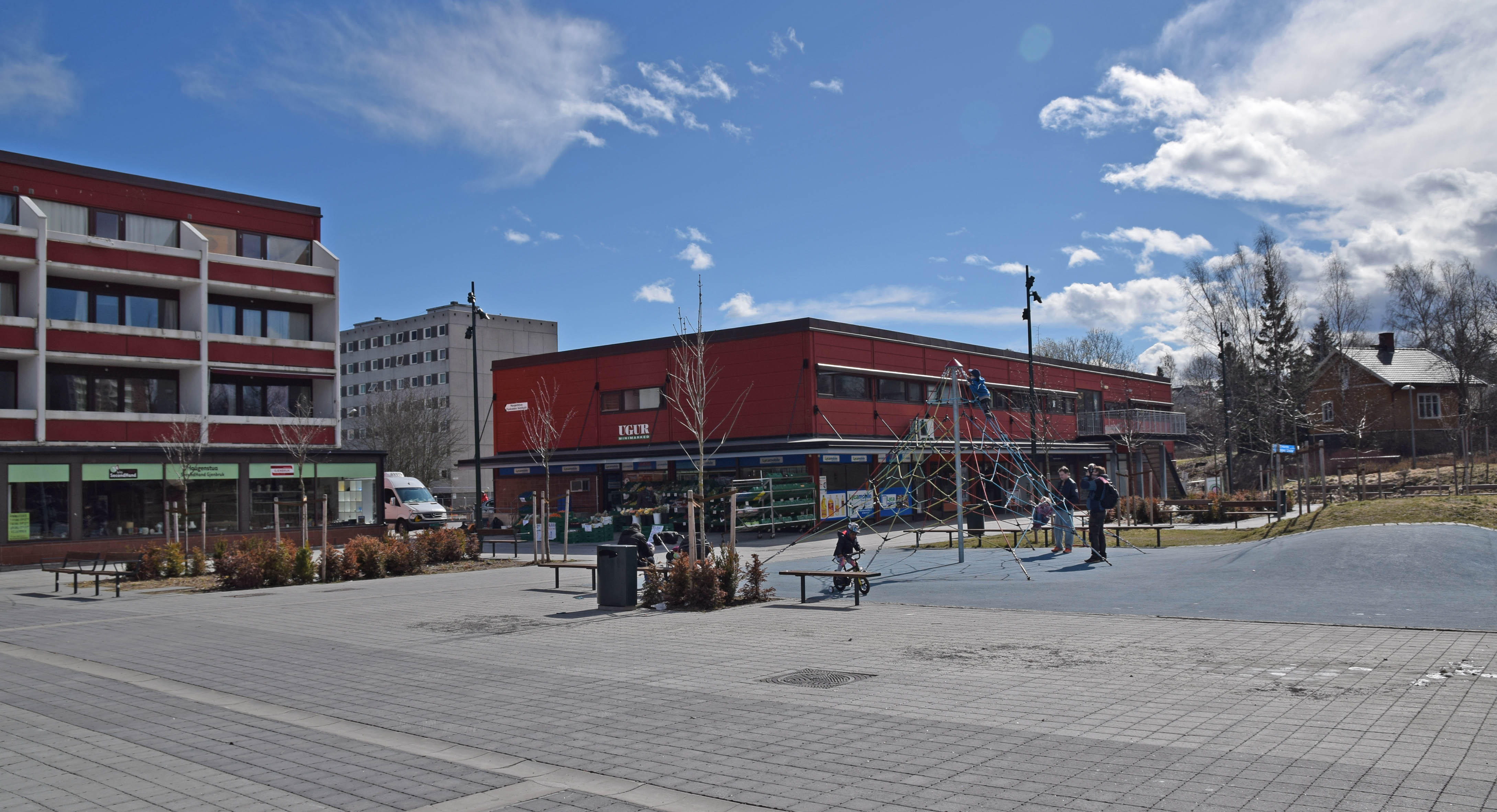 Torget på Haugenstua sett mot blokkene i Ole Brumms vei